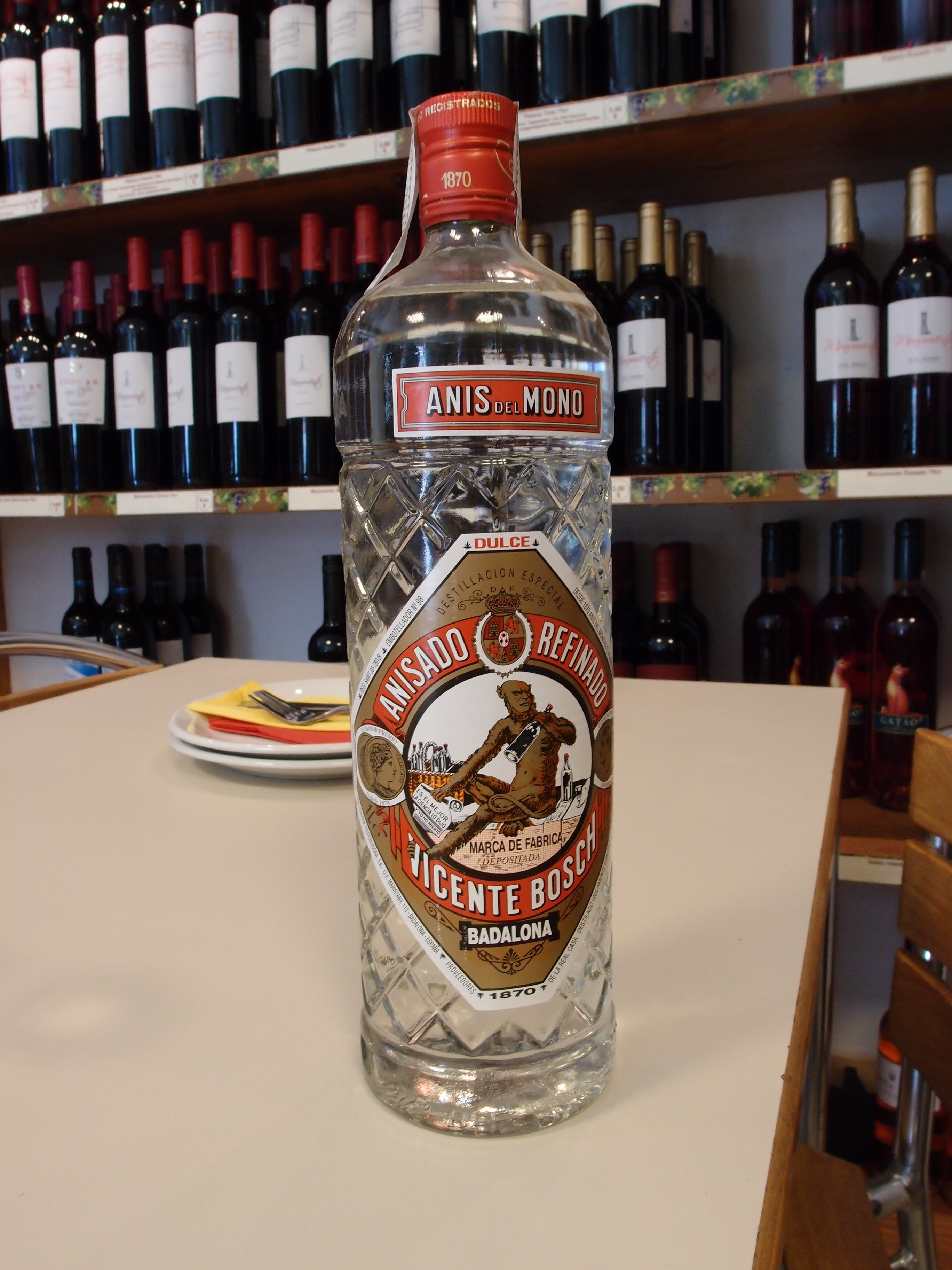 Anis del Mono Datum: 09. Juli 2011 Urheber: M. Pfeiffer alias Benutzer:Gordito1869 Quelle: privates Fotoarchiv des Urhebers